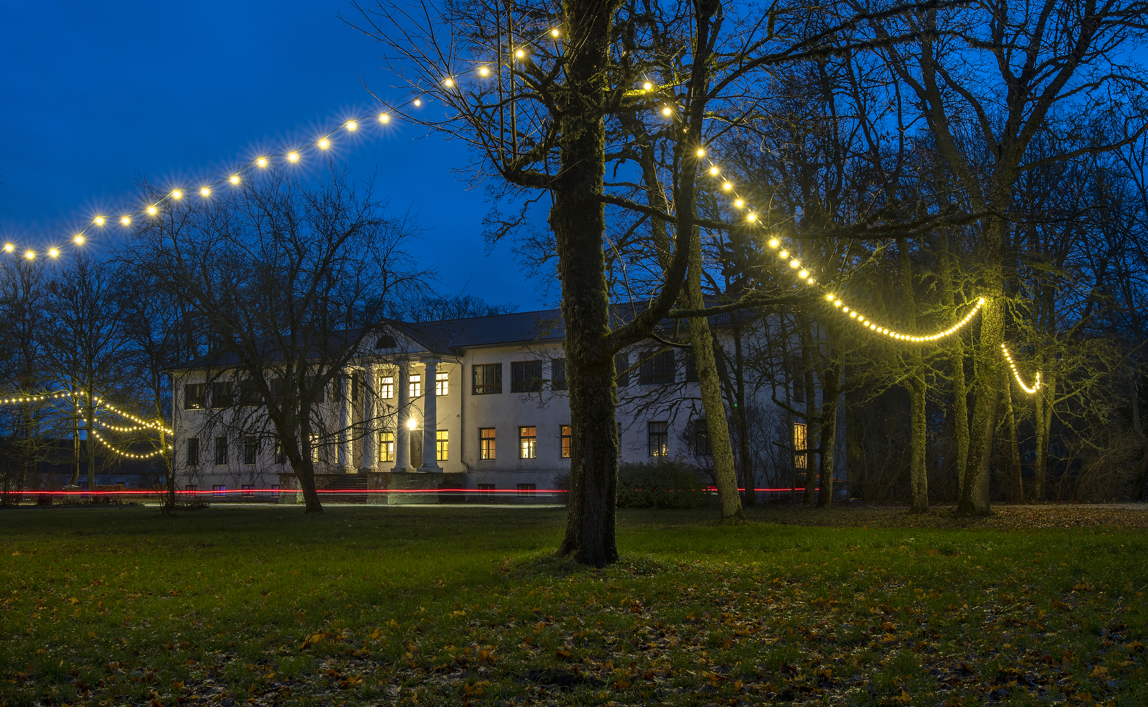 Pootsi mõisahoone